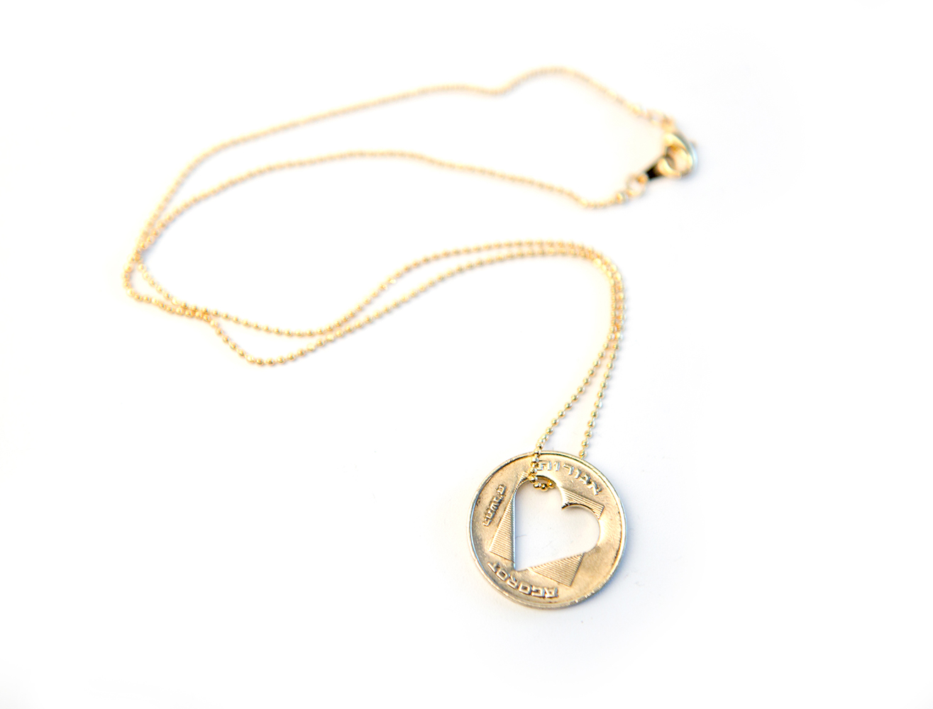 שרשרת שיצר ערמון